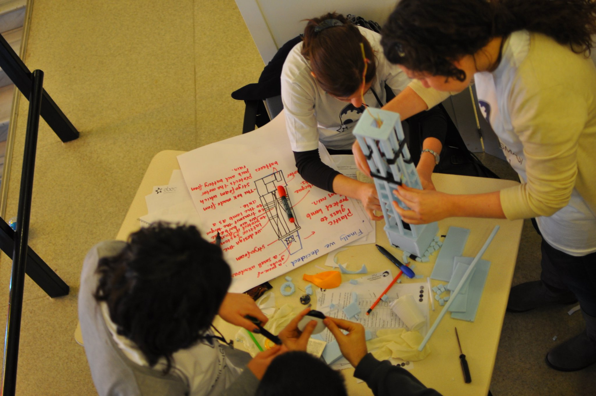 Takım Çalışması